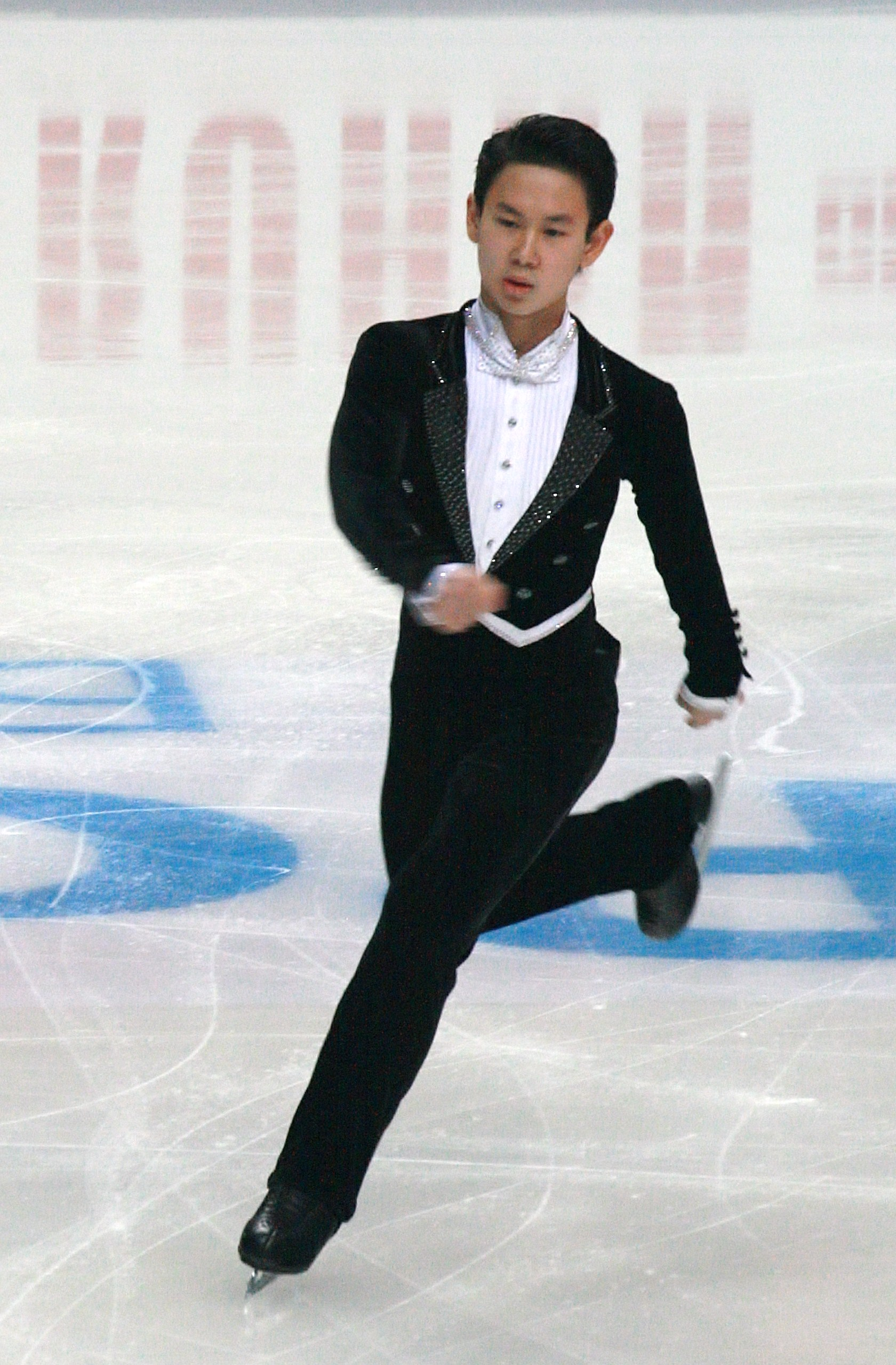 Денис Тен (Казахстан) на Кубке Ростелекома 2012. Короткая программа.